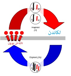 کوردی: سوڕی ژیانی زۆربوونی زایەند سوڕی زیندەخانەکان لەماوەی قۆناغەکانی زۆڕبوون و لکاندن